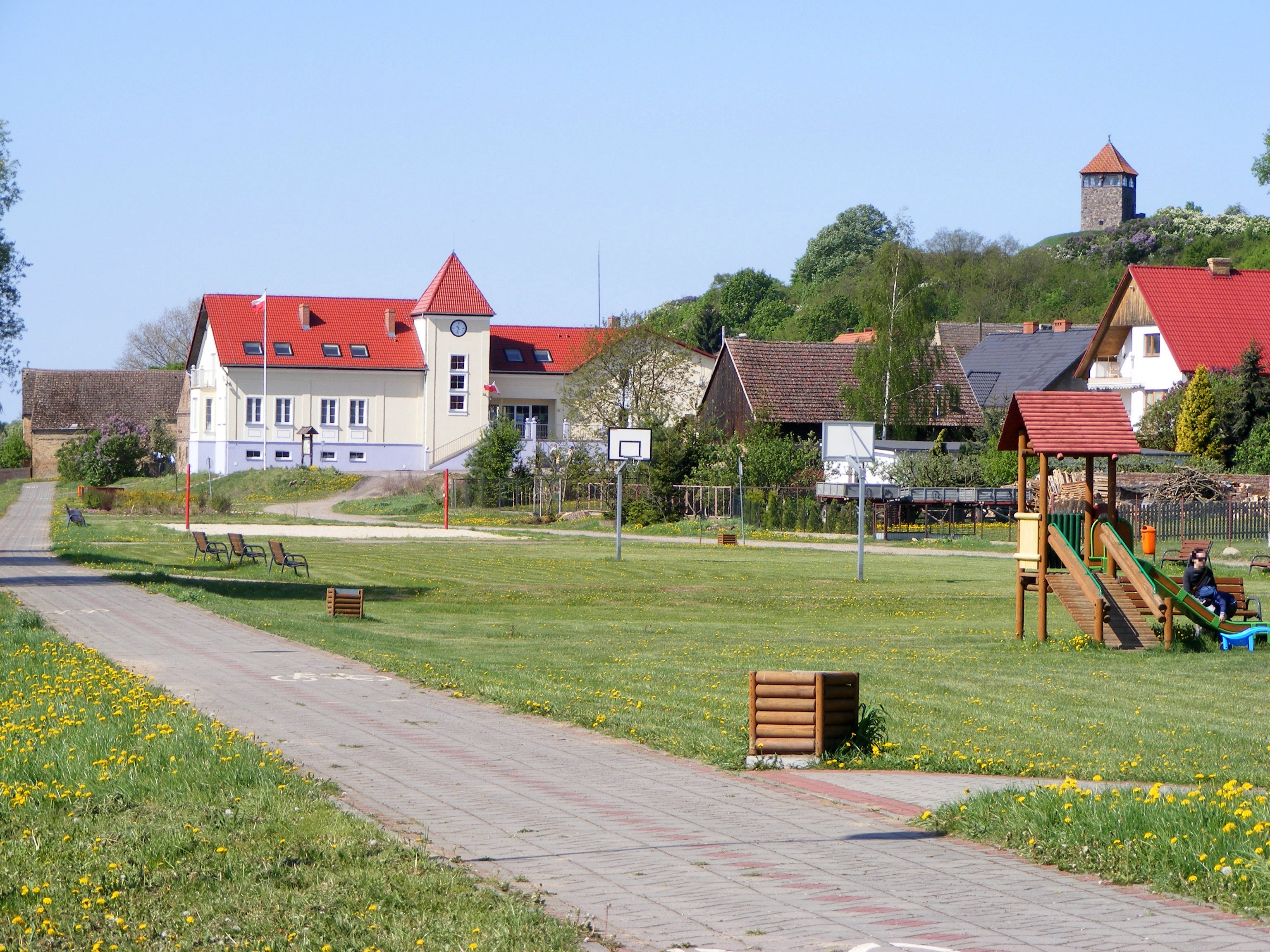 Santok